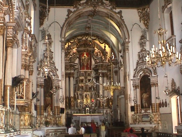 Esglèsia Bom Fim - Salvador Bahia